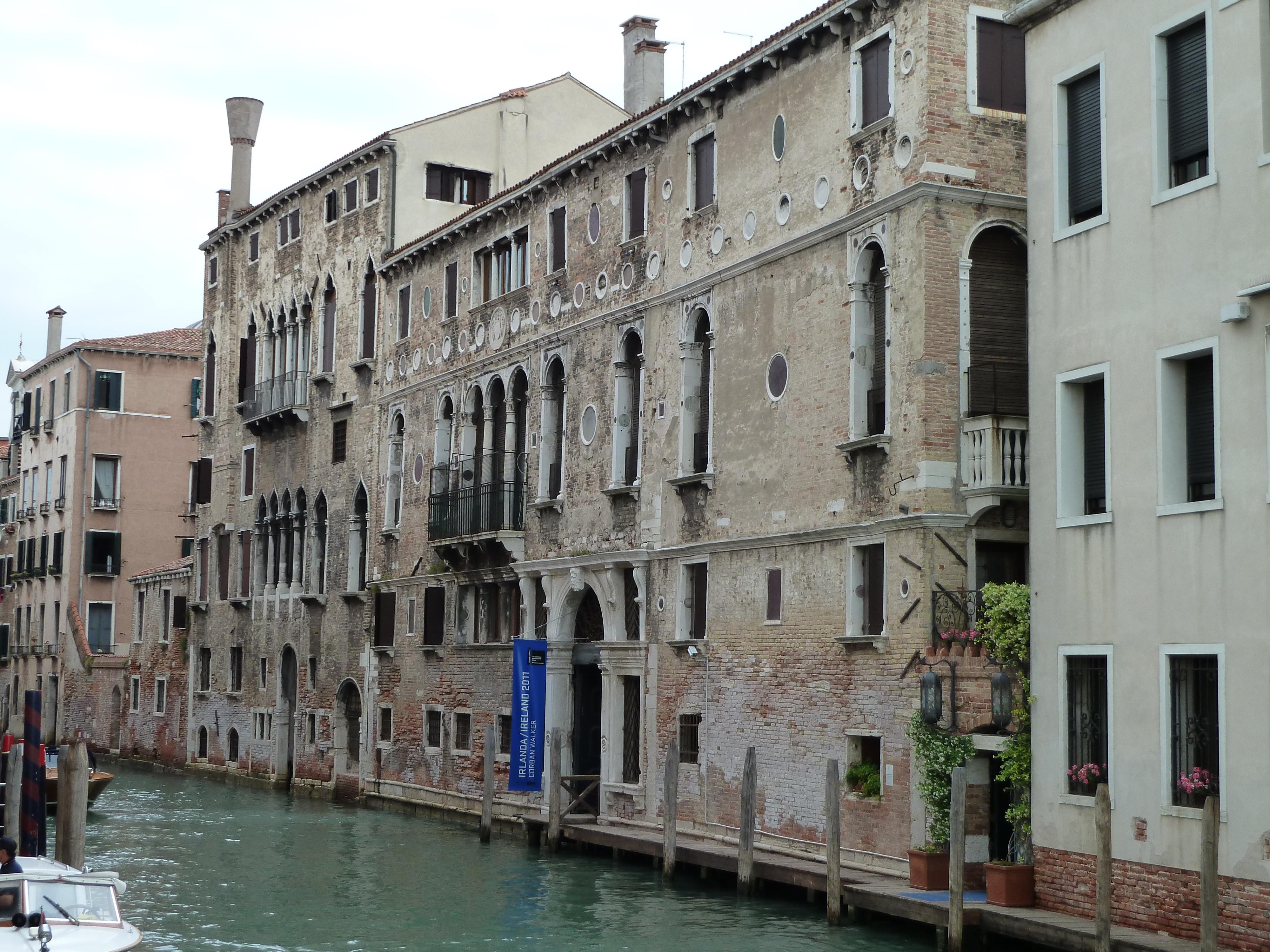 Palazzo Cappello-Memmo et Ca'Gritti (Venice)